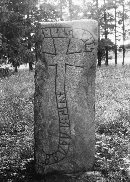 Runsten. Kategori: (09) Runstenar, bildstenarRunsten.